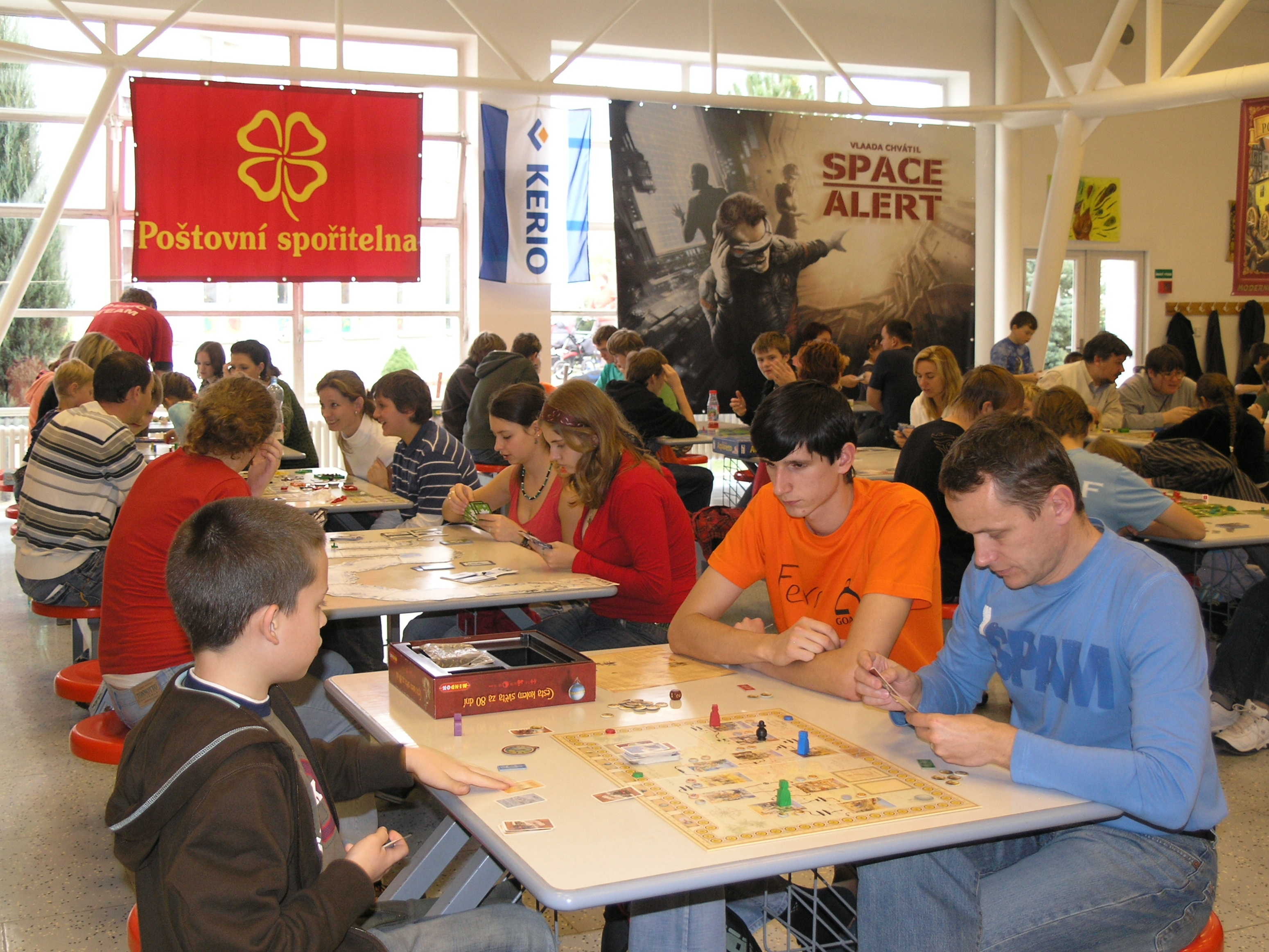 Goliáš a David 2008